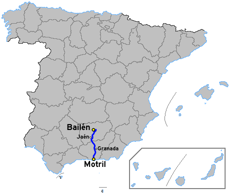 mapa de la autovia española a44